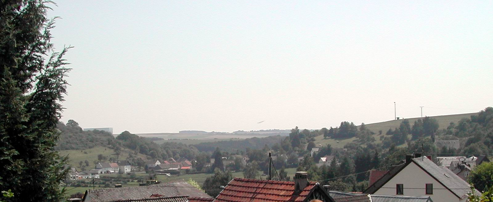 Motiv: Immerath Ort: Immerath, Eifel Aufnahmedatum: August 2004 Kamera: Nikon 885